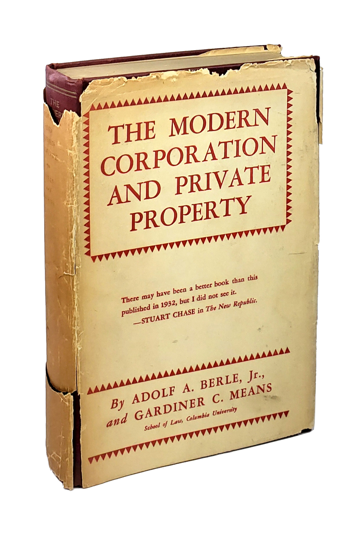 The Modern Corporation and Private Property